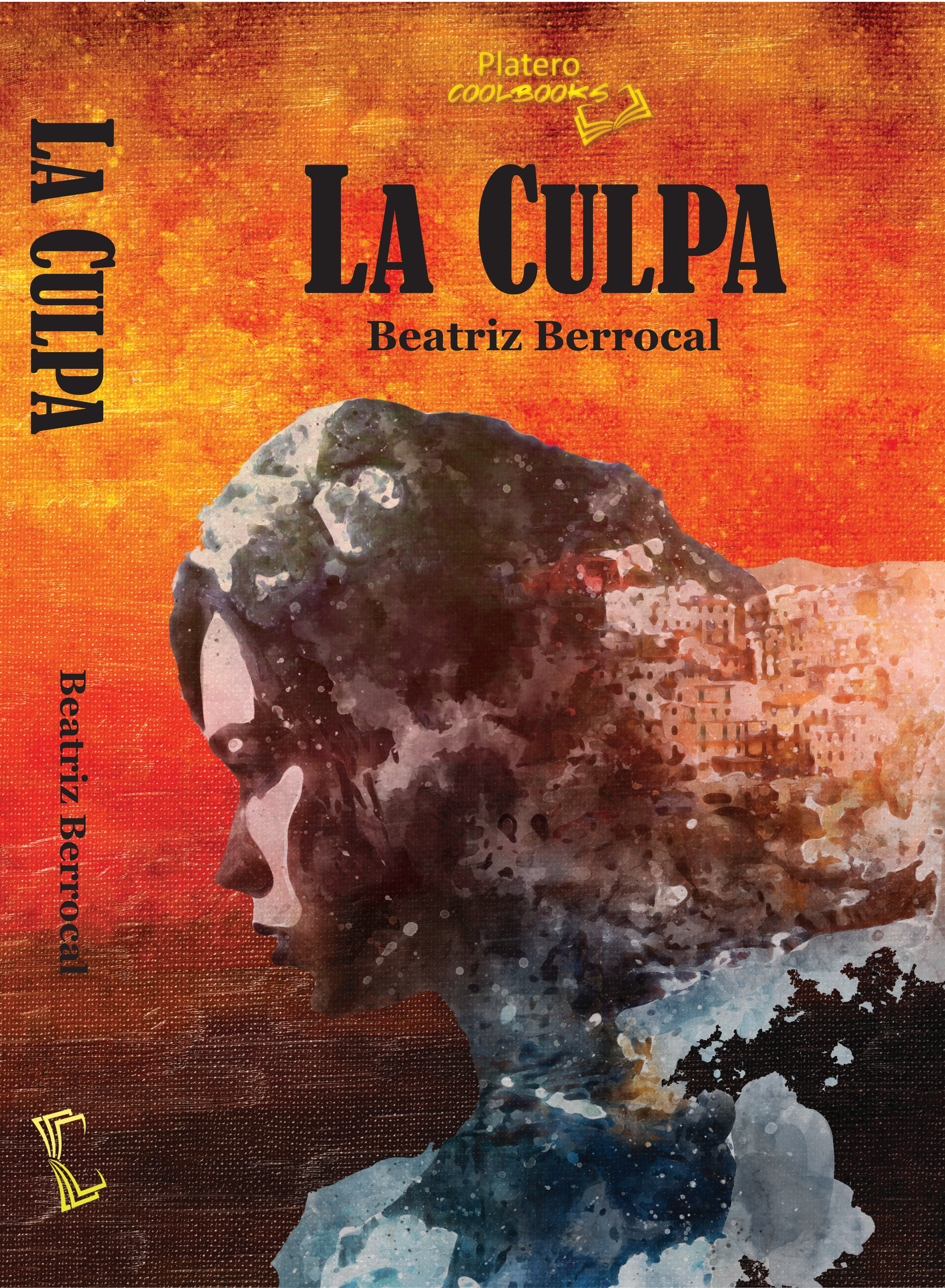 PORTADA DEL LIBRO "LA CULPA" DEL QUE SOY AUTORA